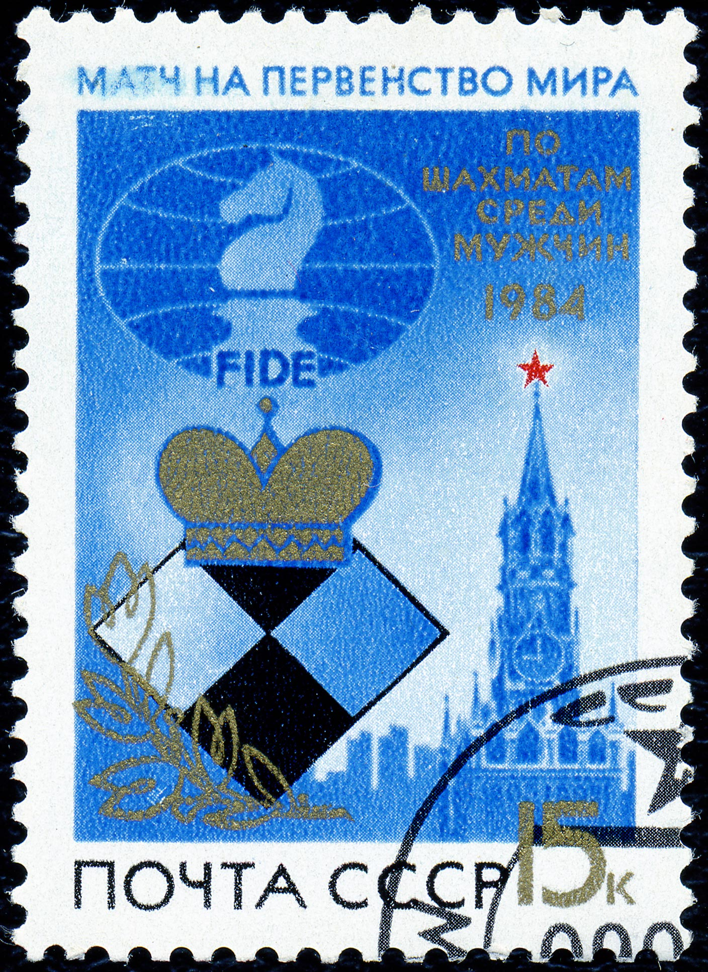 Почтовая марка СССР. 1984. Матч на первенство мира по шахматам среди мужчин